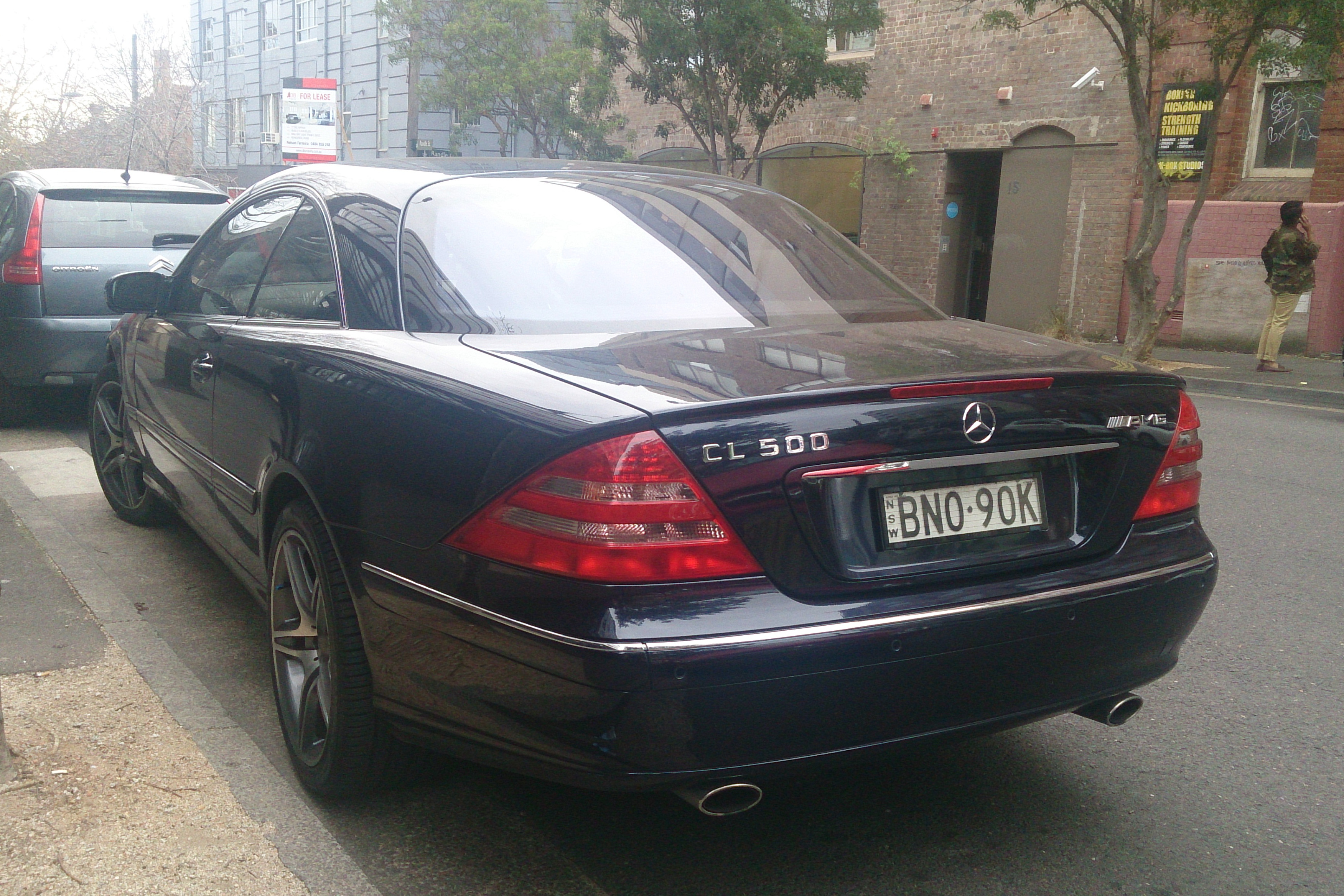 Mercedes-Benz CL500